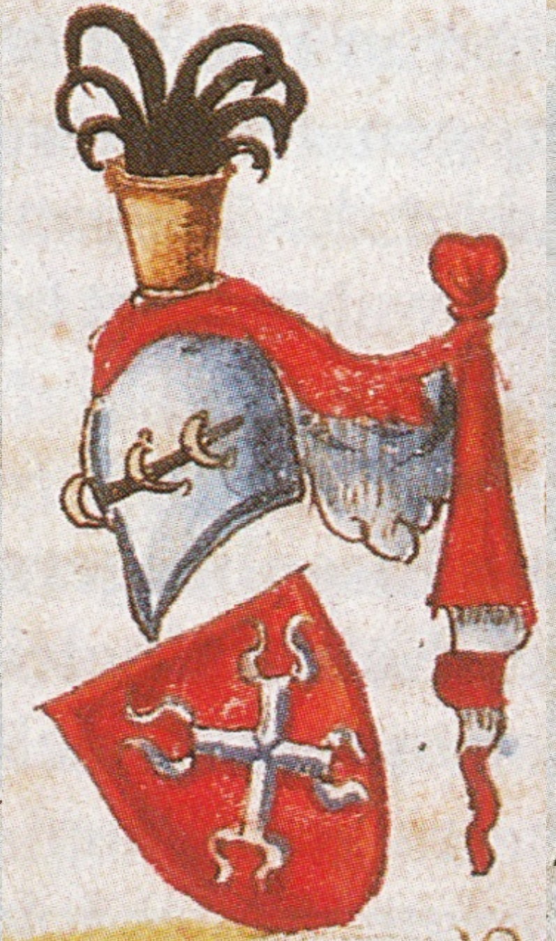 Wappen von Buches zu Wasserloß